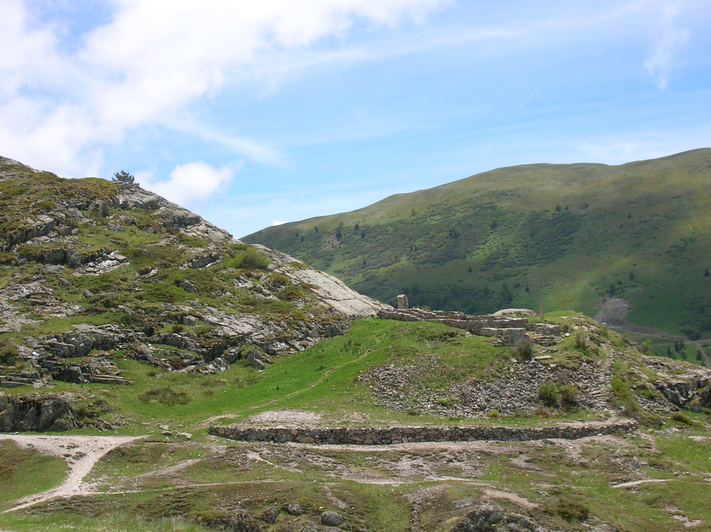 Site minier des Brandes et château. L'Alpe d'Huez, Isère, AuRA, France.